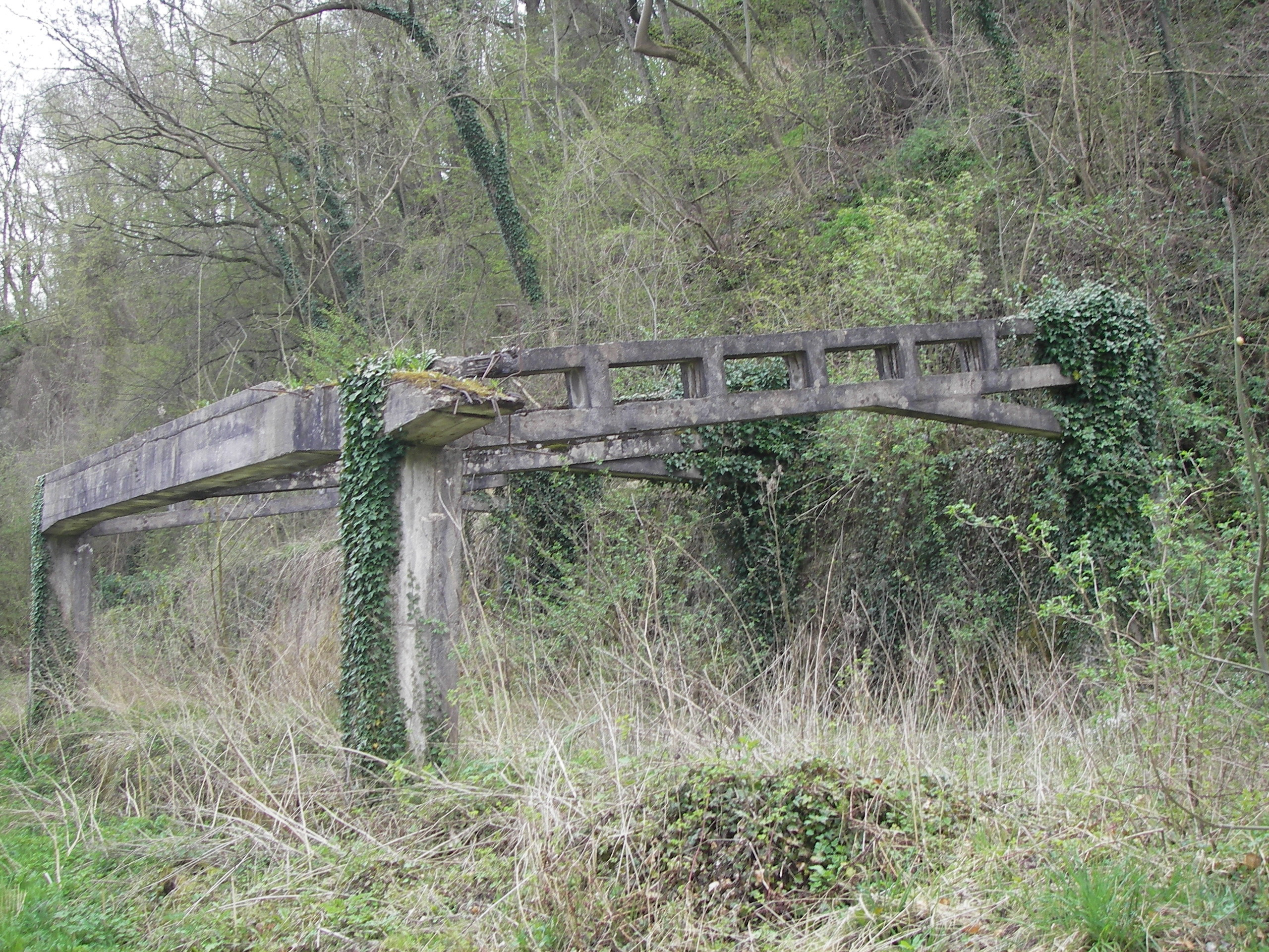 Oorlogsmonument Bronsdaelgroeve: Resten van een deels ondergrondse reparatiewerkplaats voor motoren van Nazi-Duitse bommenwerpers.